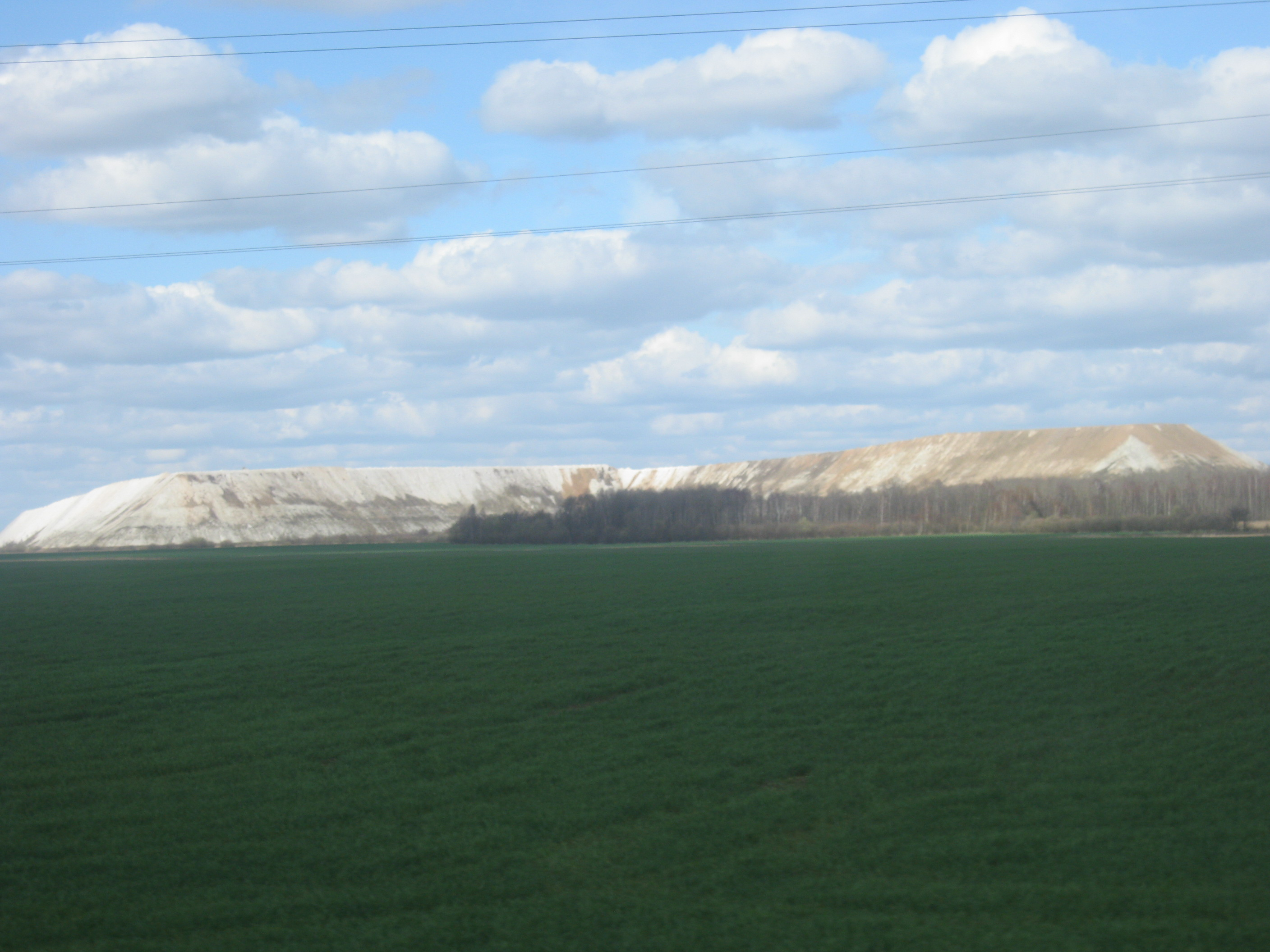 AB “Lifosa" fosfogipso kalnai